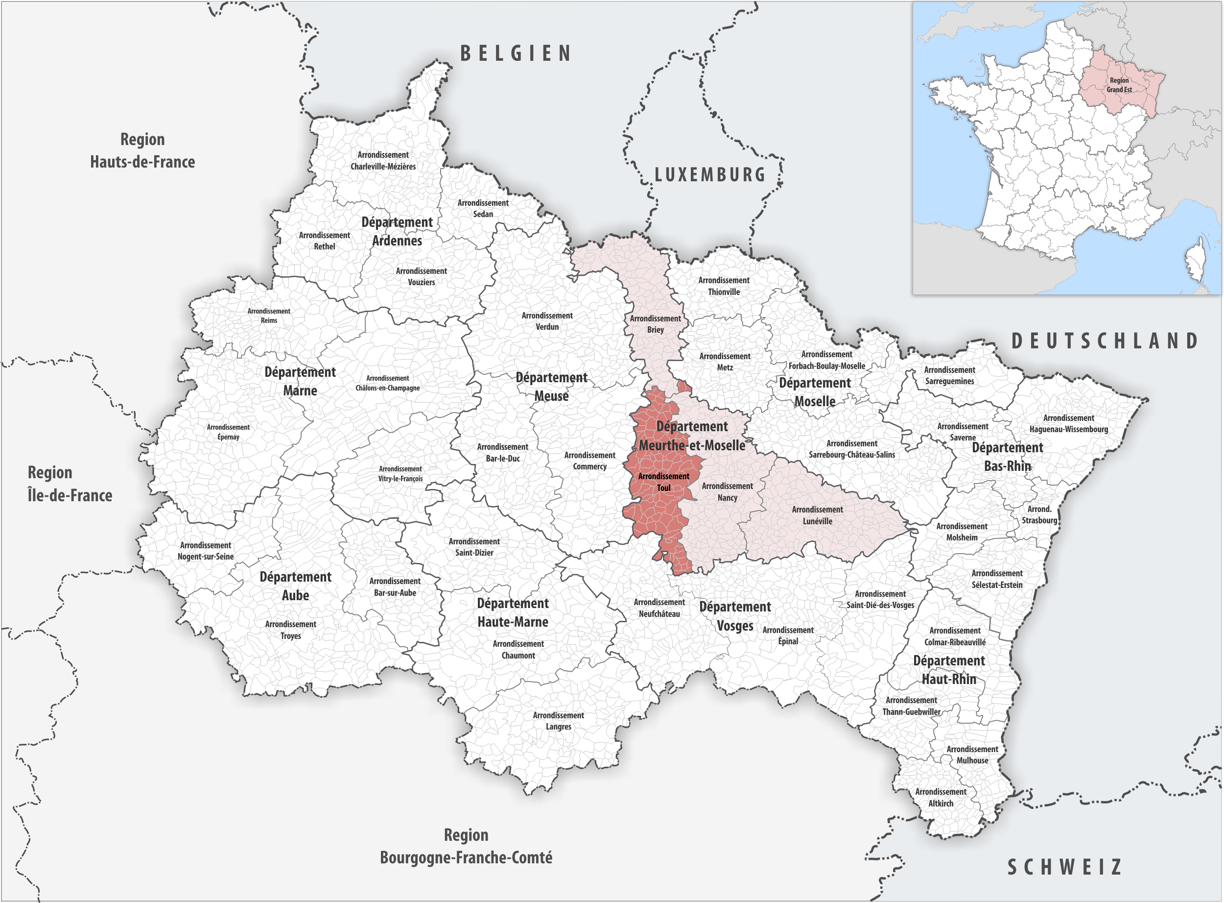 Lage des Arrondissements Toul